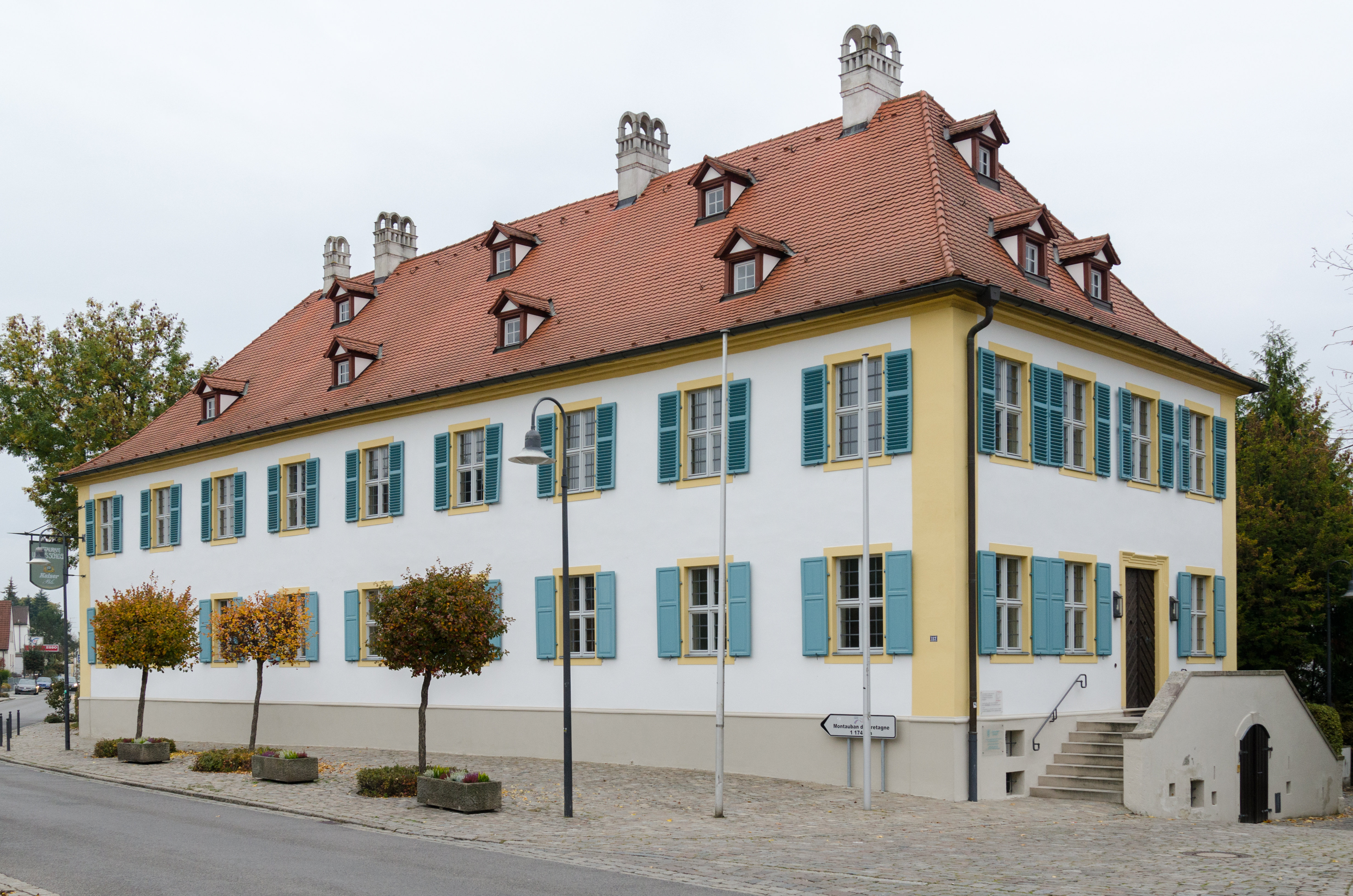 Bischberg, Hauptstraße 112